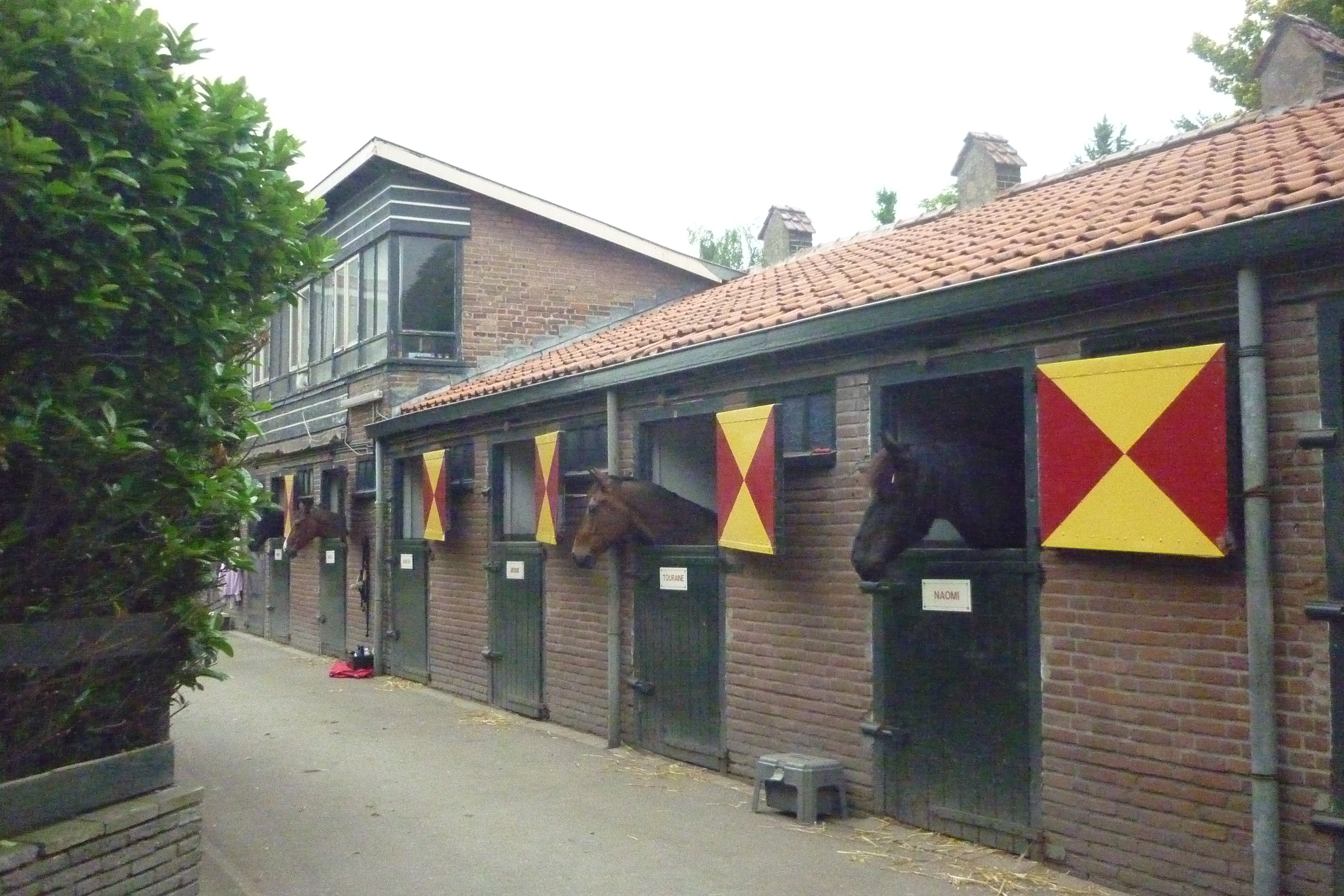 Riouw Rijschool in Den Haag